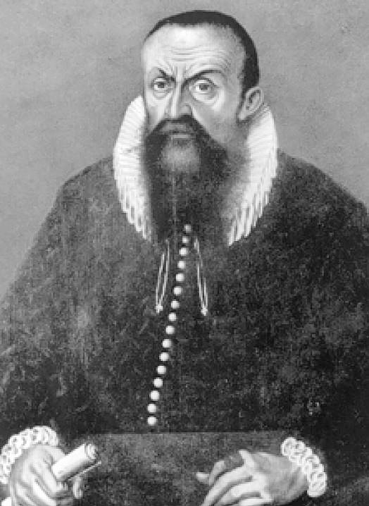 David & Heinrich Werdmüller 1548-1612, Zürich, Schweiz